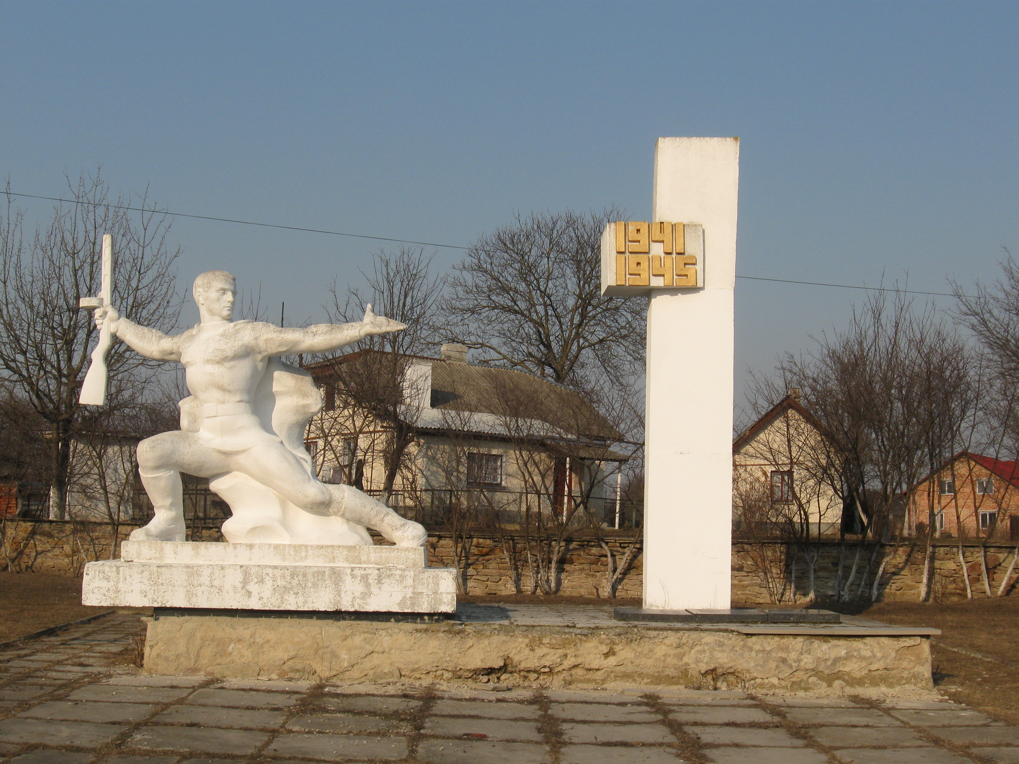 Сади.Пам'ятник загиблим (односельчанам?) у ВВВ